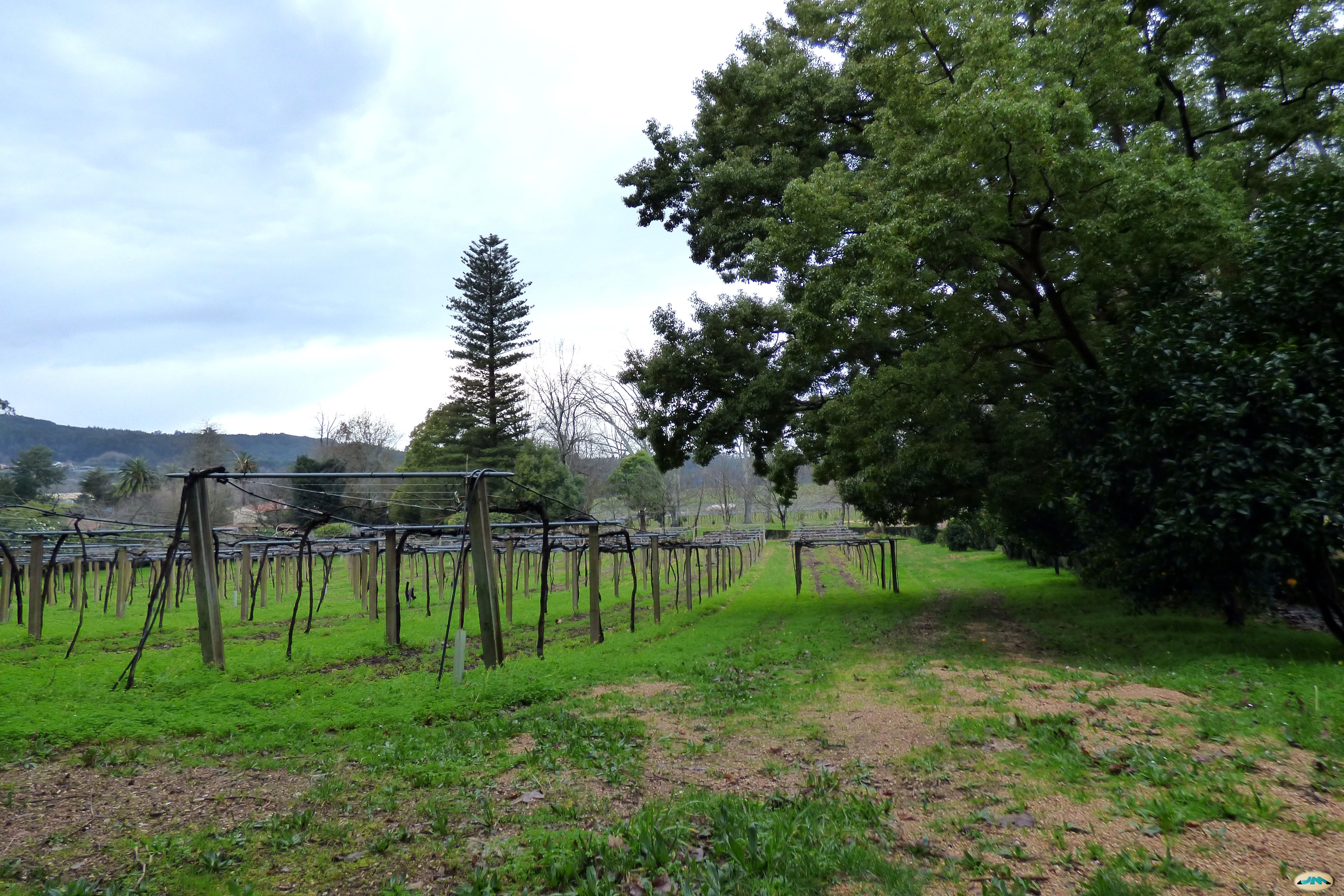 Parras en Rubians